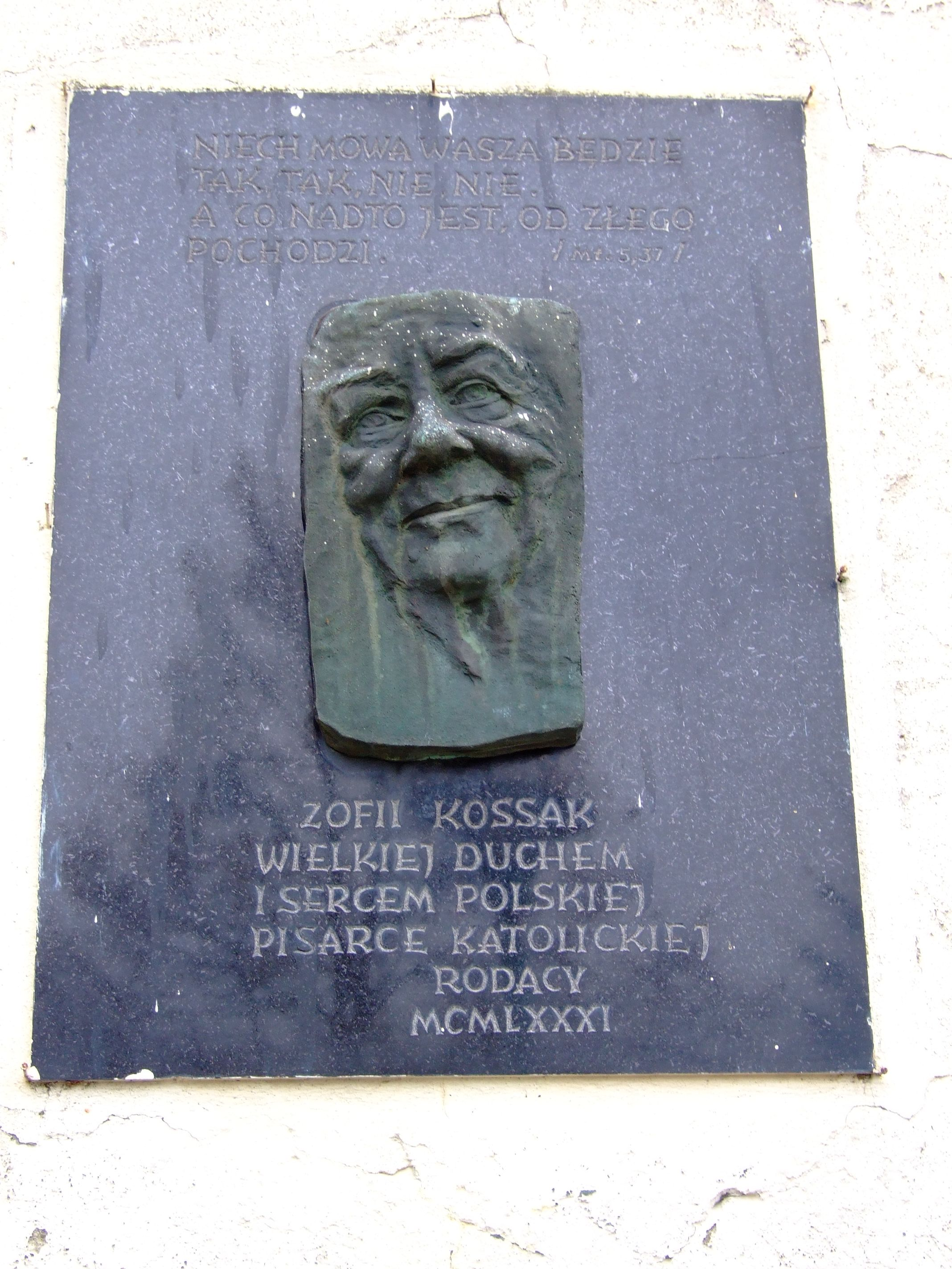 Tablica upamiętniająca Zofię Kossak na kościele Wszystkich Świętych w Górkach Wielkich